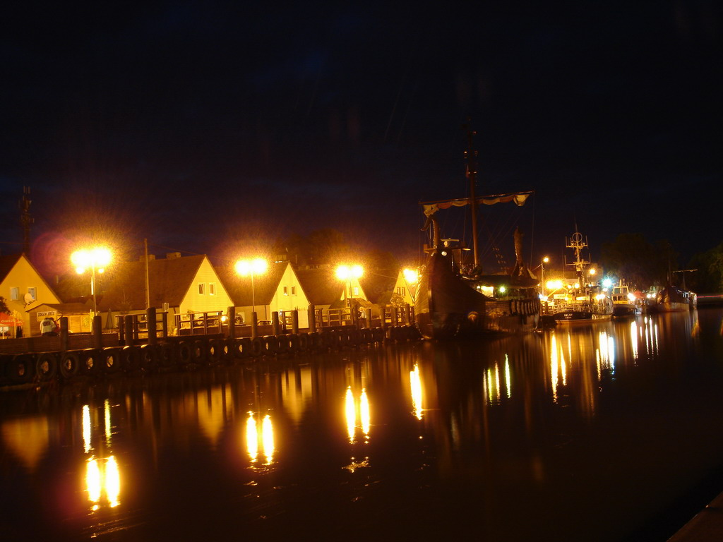 Łeba, Hafenbecken bei Nacht